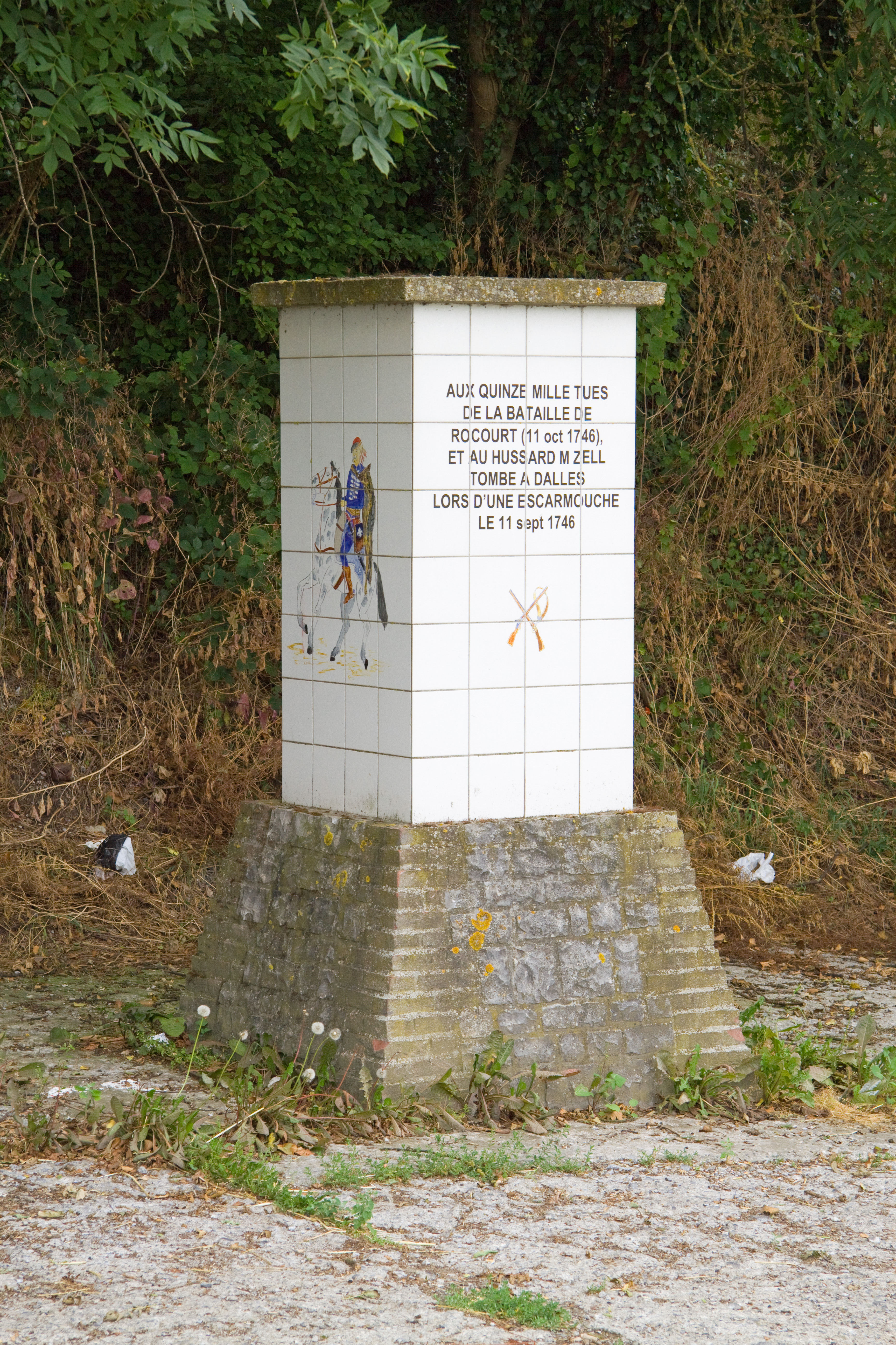 Un des rares souvenirs de la bataille de Rocourt; monument érigé à Glons